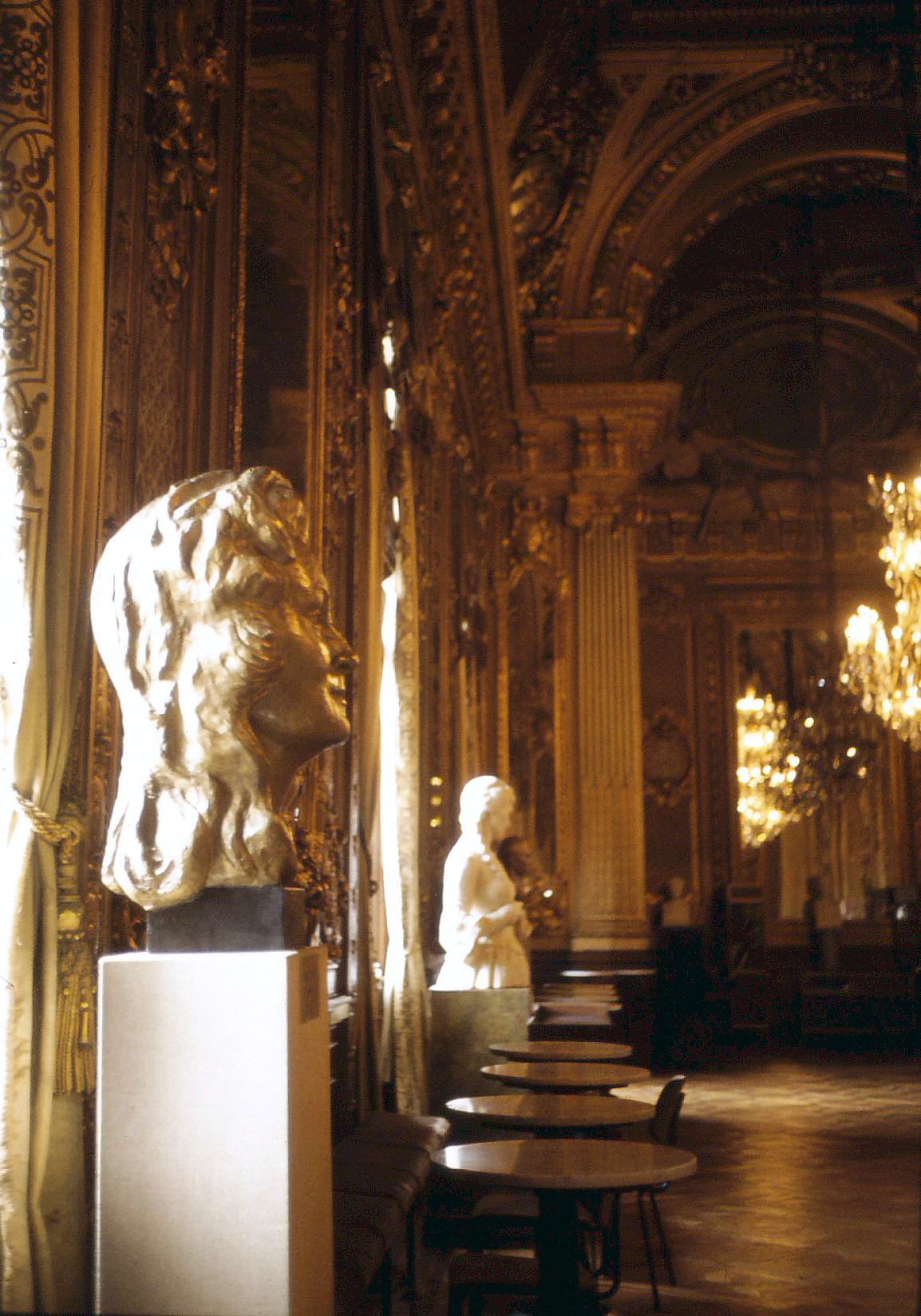 Operan i Stockholm, Guldfoajén, t.v. en byst skapd av Carina Ari föreställande Birgit Nilsson.